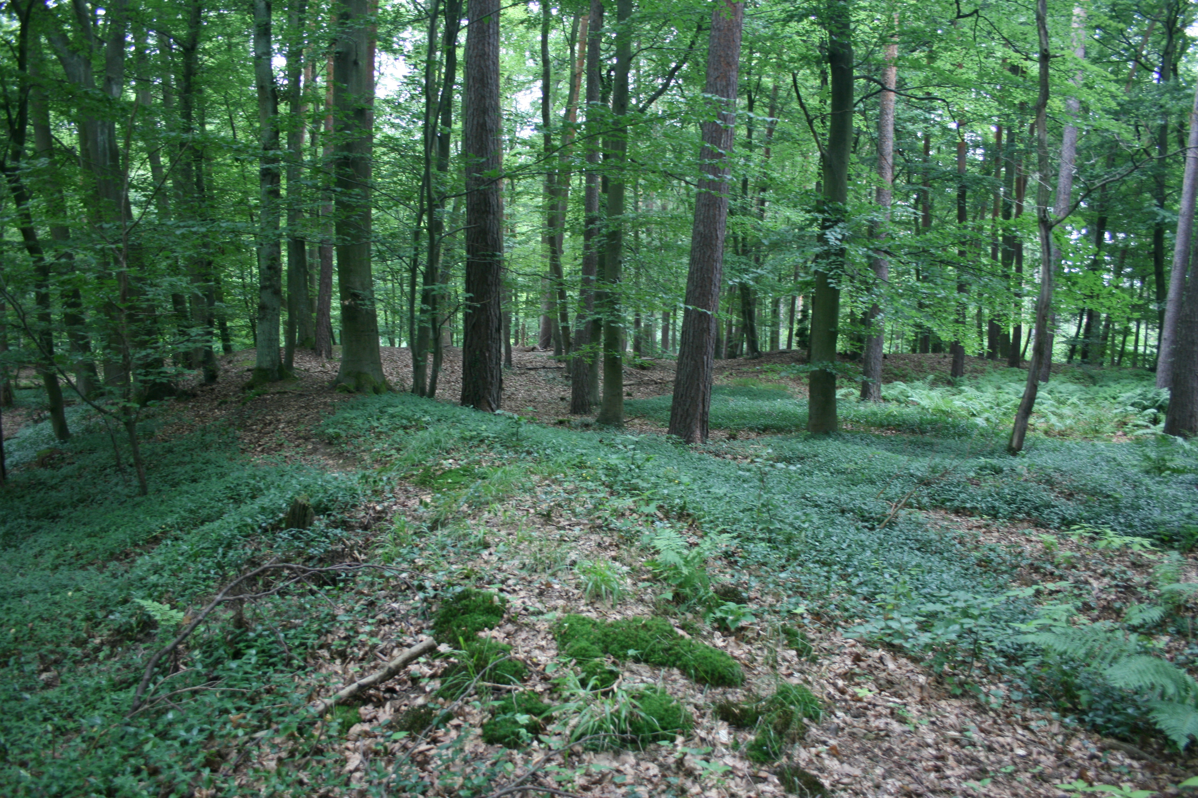 Kleinkastell Hunnenkirchhof bei Butzbach, Blick in den Innenbereich des Steinkastells, der Wall ist noch gut erkennbar.